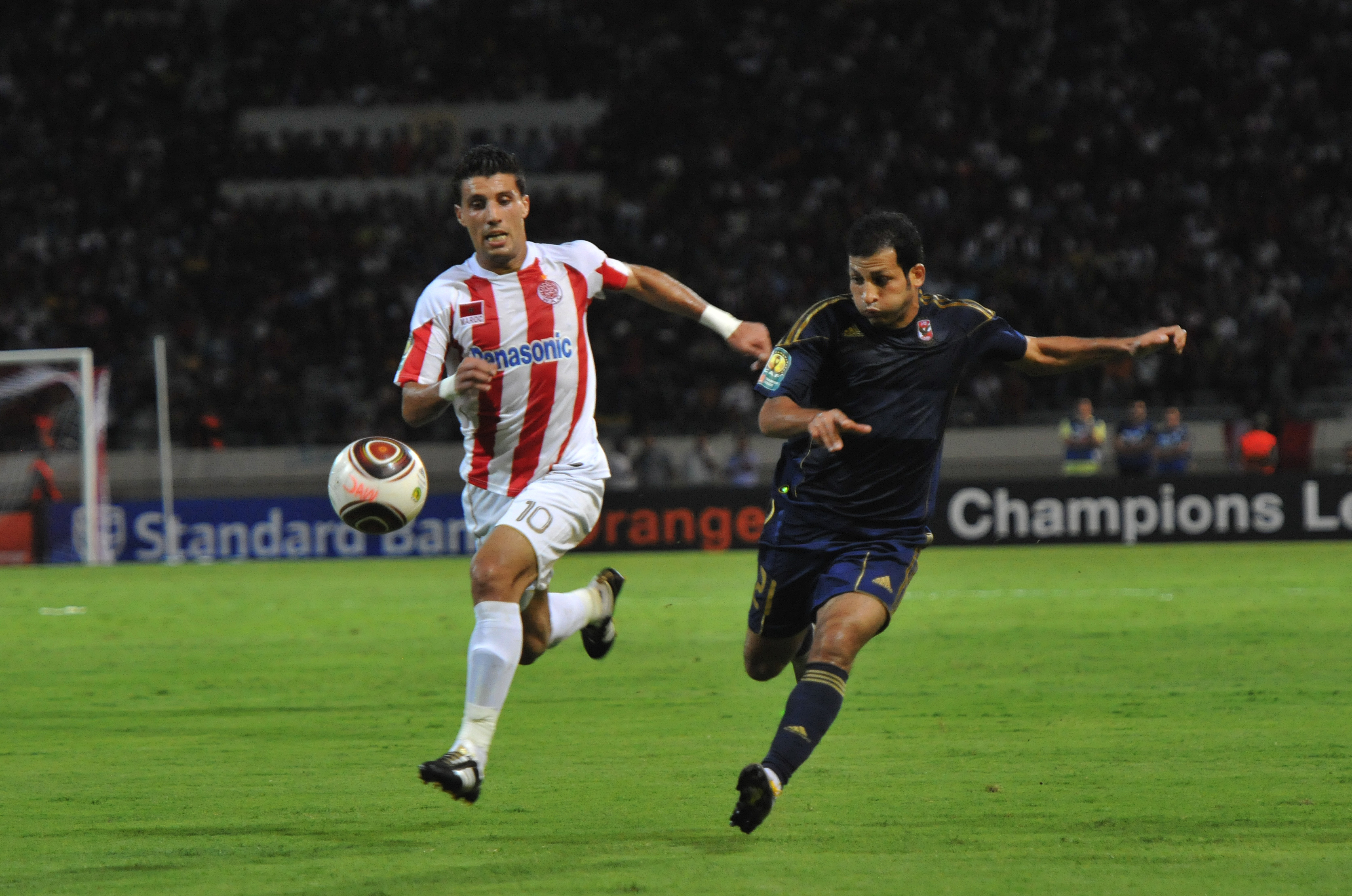 Match WAC vs Al Ahly